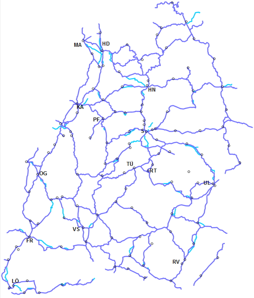 Radnetz Baden-Württemberg